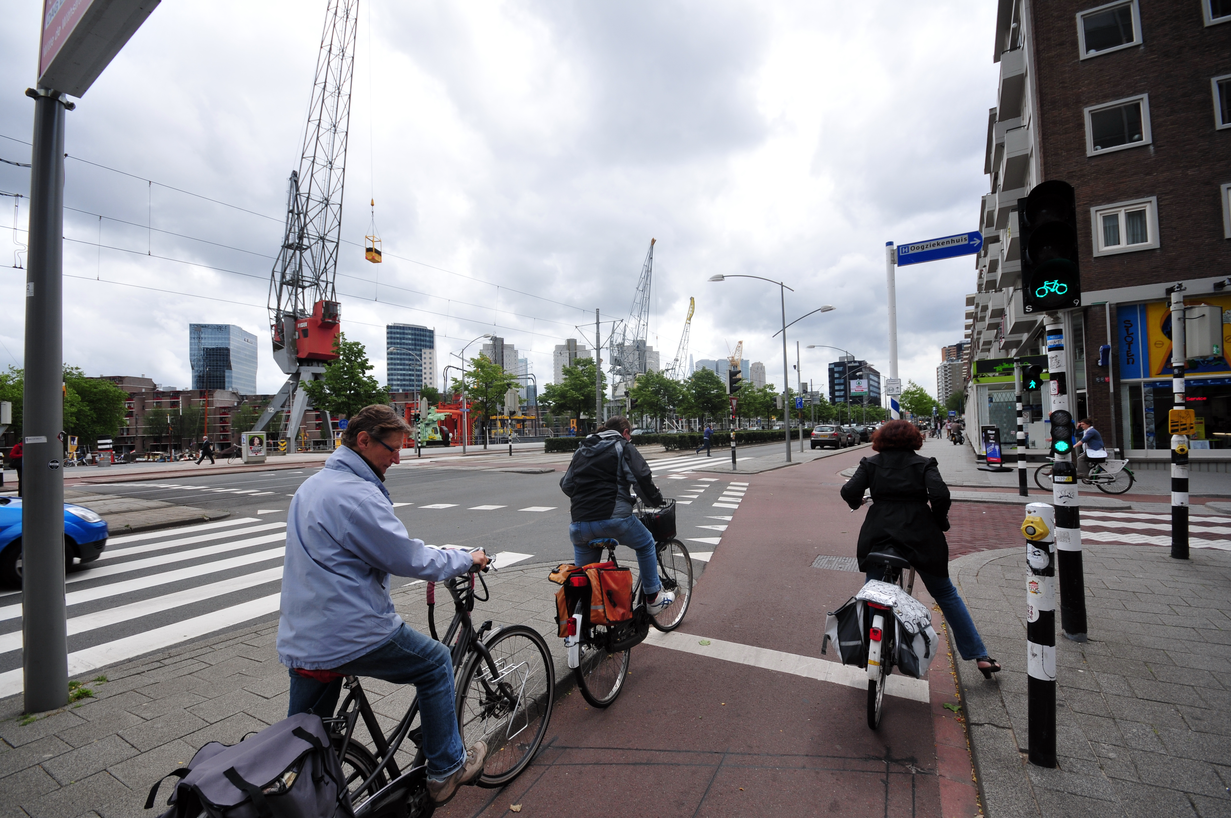 Rotterdam, Niederlande, 2013